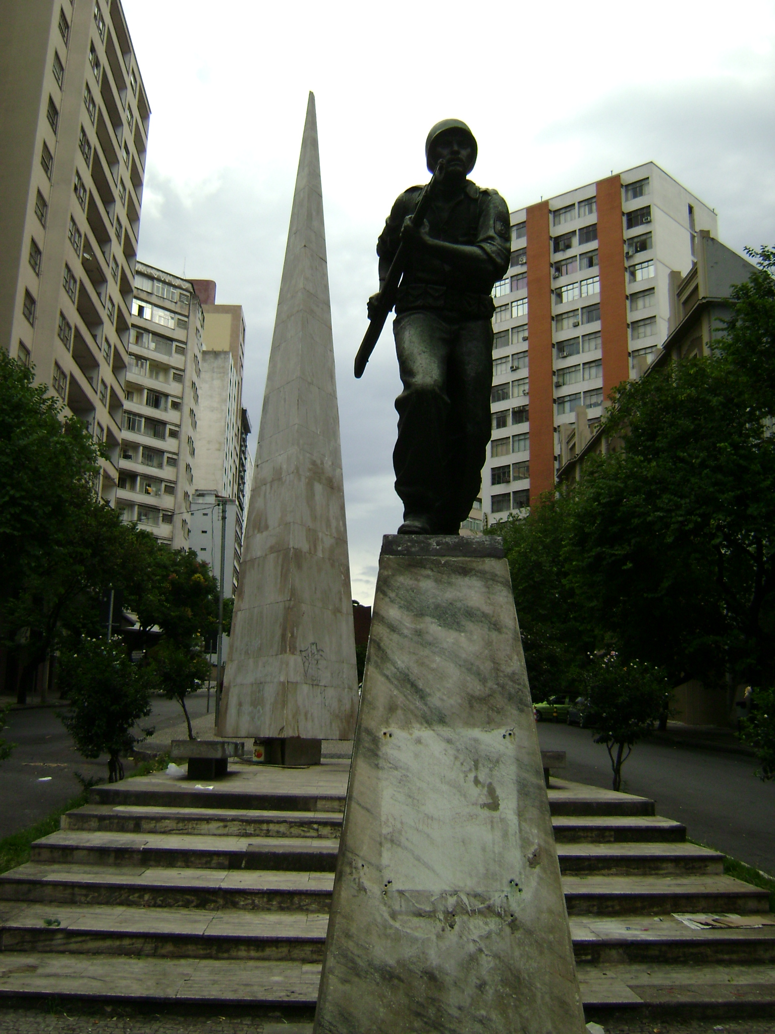 Homenagem aos praças Brasileiros da Segunda Guerra Mundial, na avenida Álvares Cabral, em Belo Horizonte. A inscrição abaixo do soldado foi arrancada.